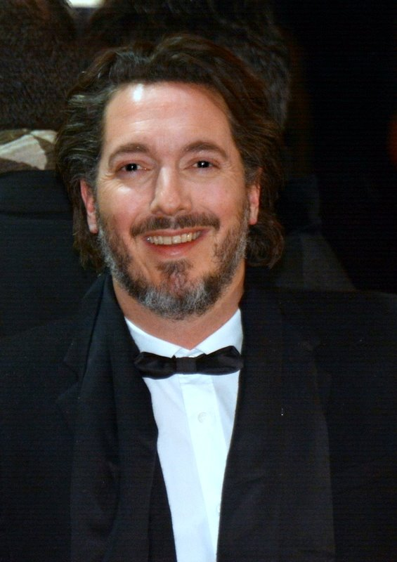 Guillaume Gallienne à la cérémonie des César